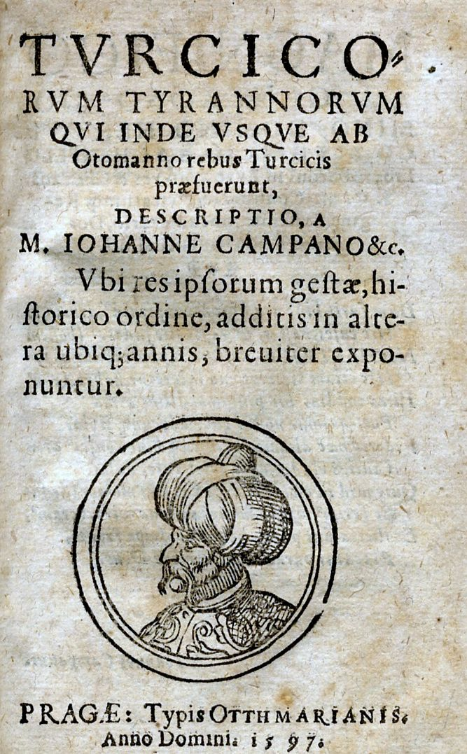 Title page of Jan Campanus Vodňanskýs Turcicorum tyrannorum qui inde usque ab Otomanno rebus Turcicis praefuerunt. (1597)